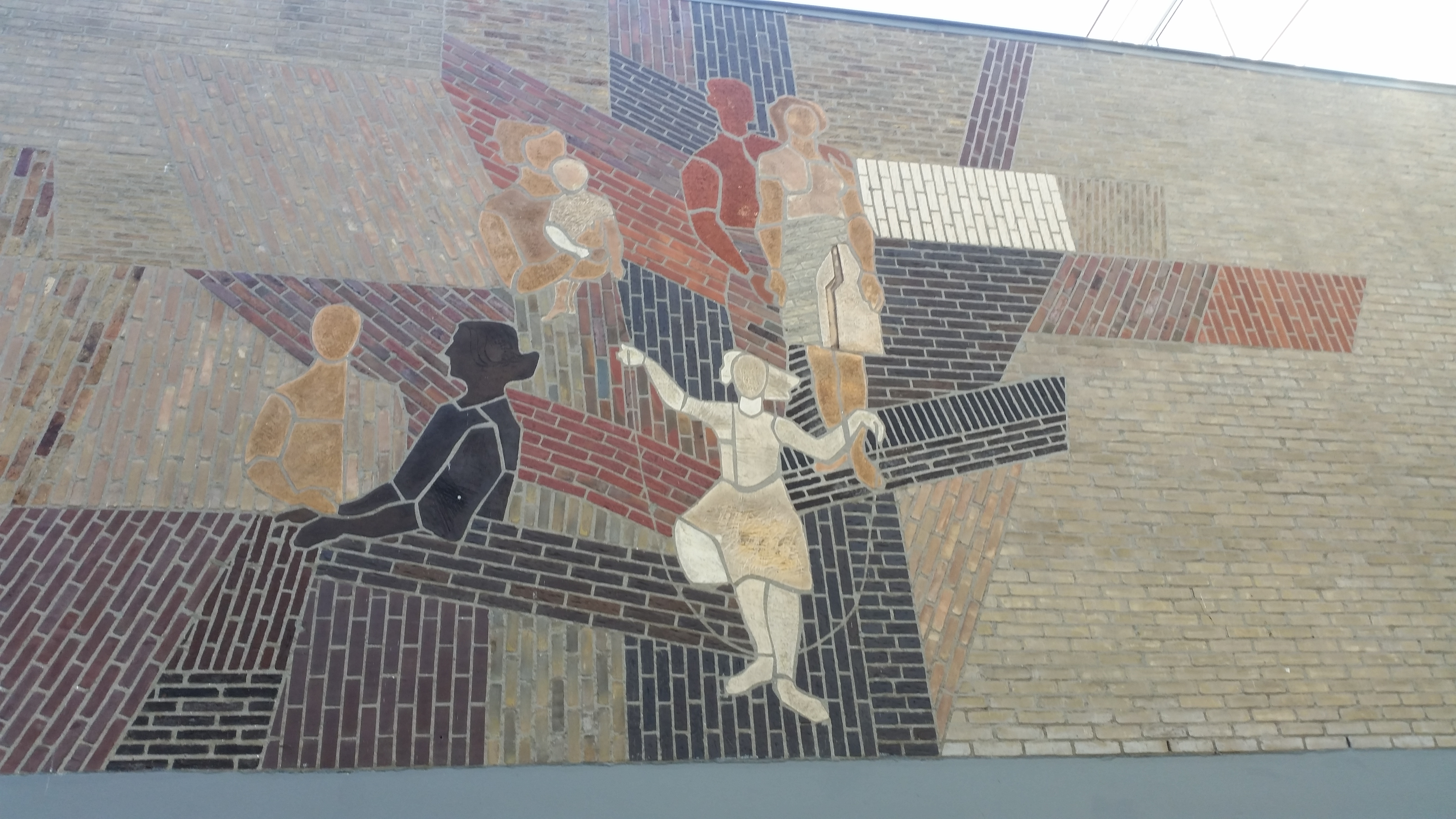 Schoolfiguren, fragment